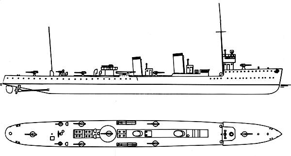 Riss Der italienischen Zerstörers Audace (II)